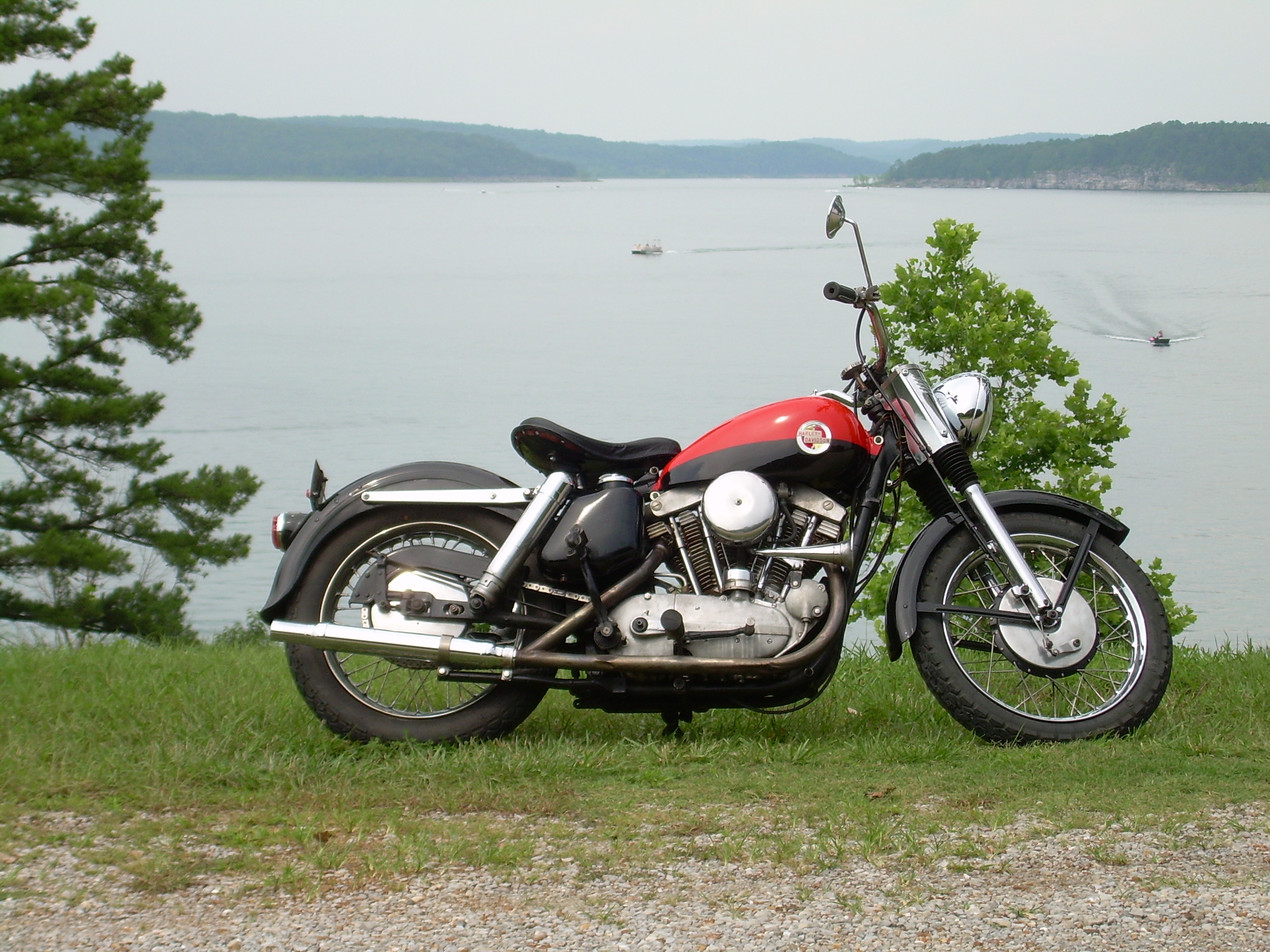 Harley Davidson Sportster at Norkolk Lake